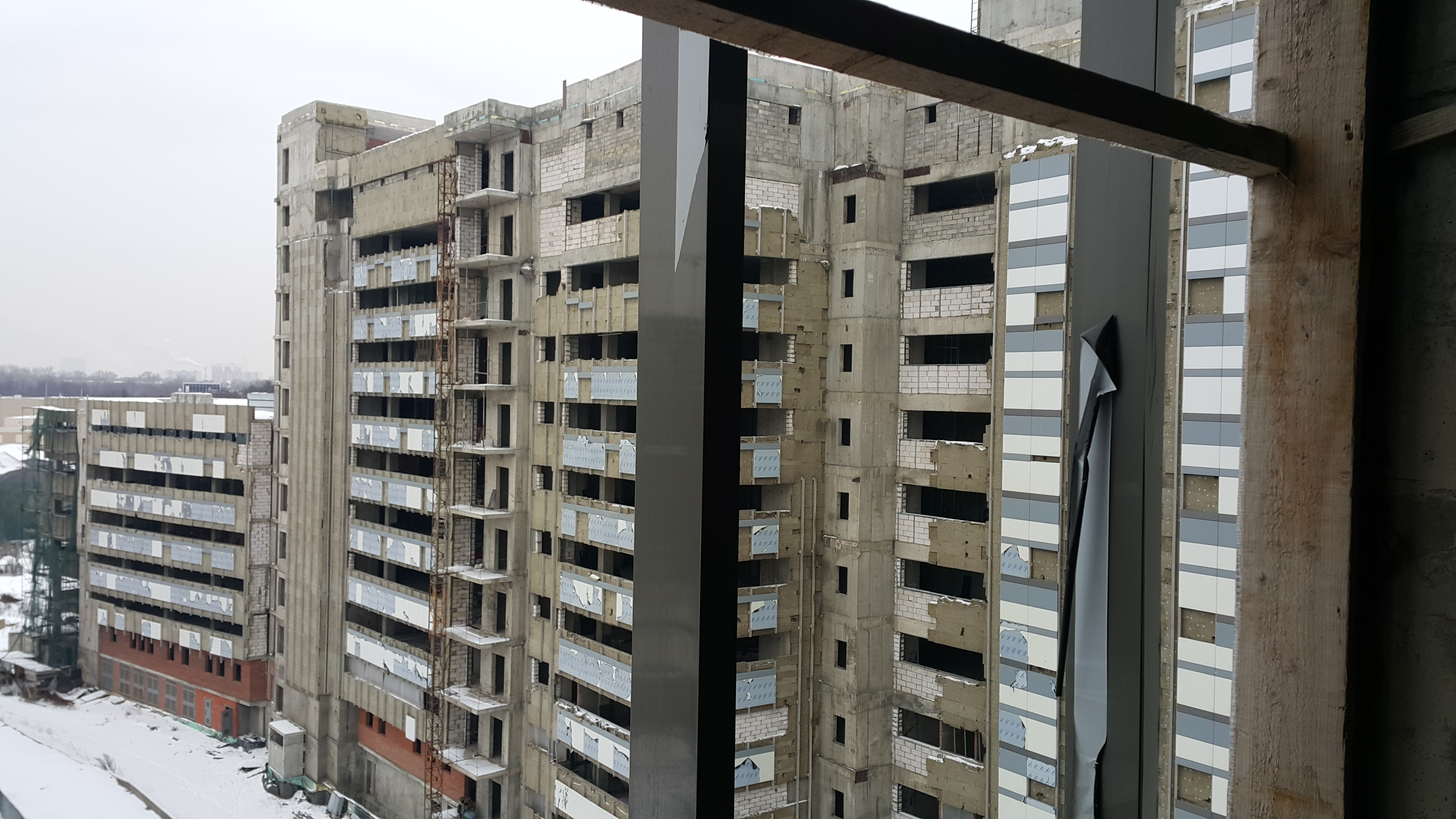 Фасад недостроенного госпиталя ВЦЭРМ МЧС, больше известного как Давыдковская заброшенная больница